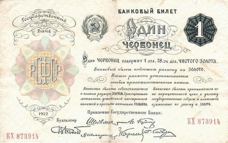 1 Червонец 1922. РСФСР. Аверс. Односторонняя купюра.